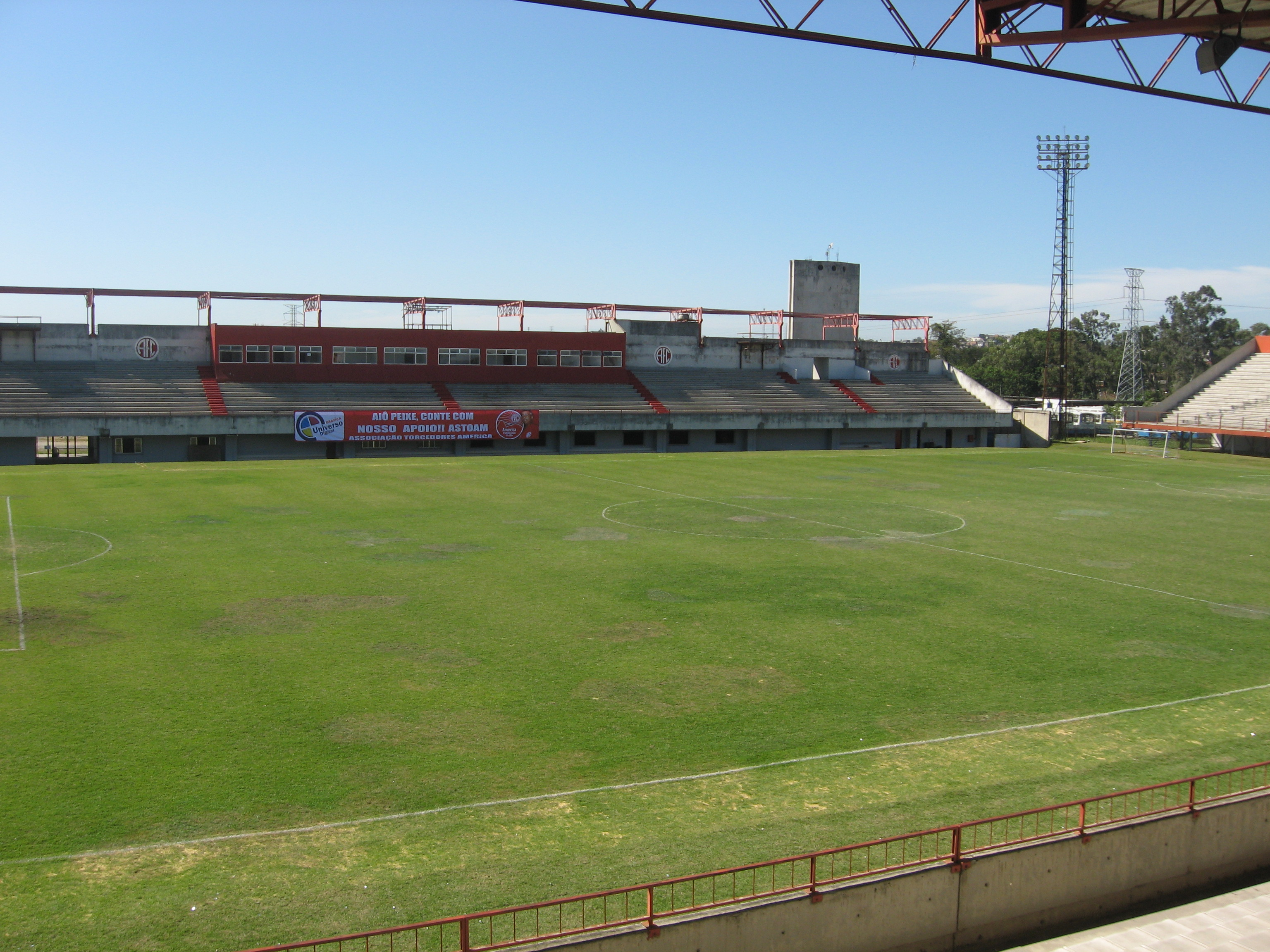 Estádio Giulite Coutinho, localizado em Mesquita, pertencente ao América FC.